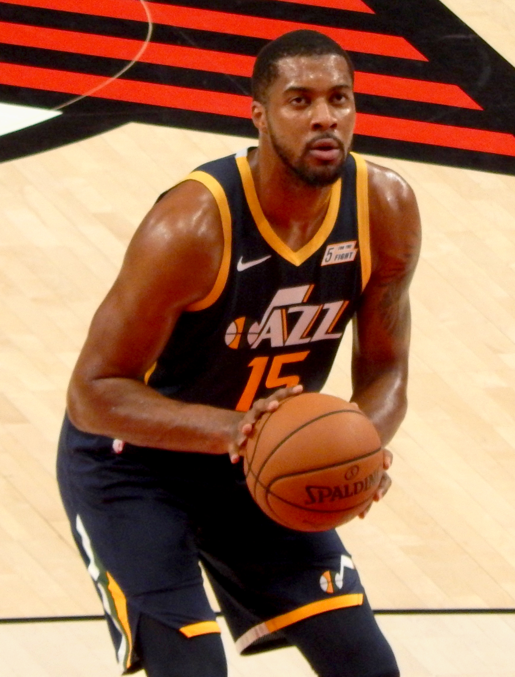 Derrick Favors #15 of the Utah Jazz against the Portland Trail Blazers on October 7, 2018 at Moda Center in Portland, Oregon.